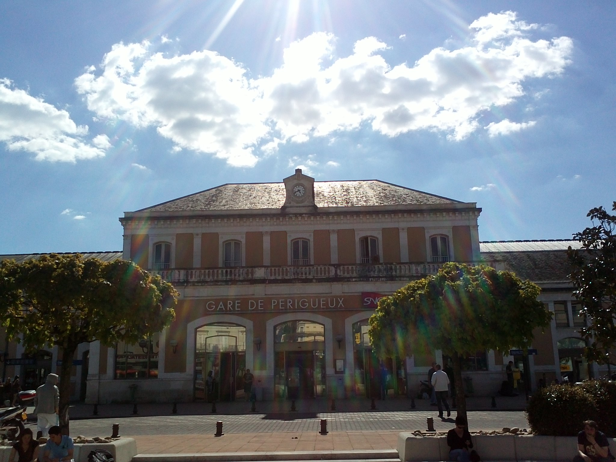 Gare de Périgueux-2013